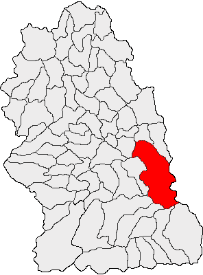 Categorie:Hărţi ale judeţului Hunedoara